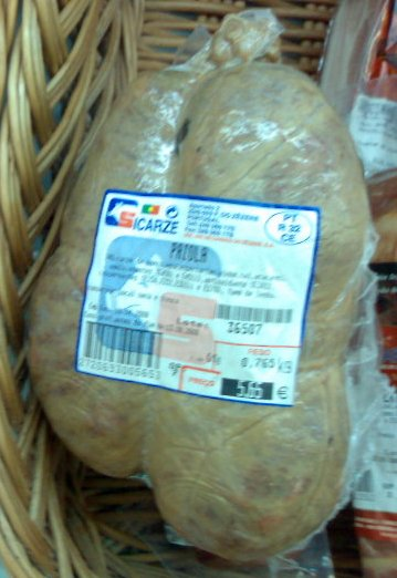 Paiola, um enchido típico do Alto Alentejo, em Portugal. Paiola, a traditional portuguese sausage.